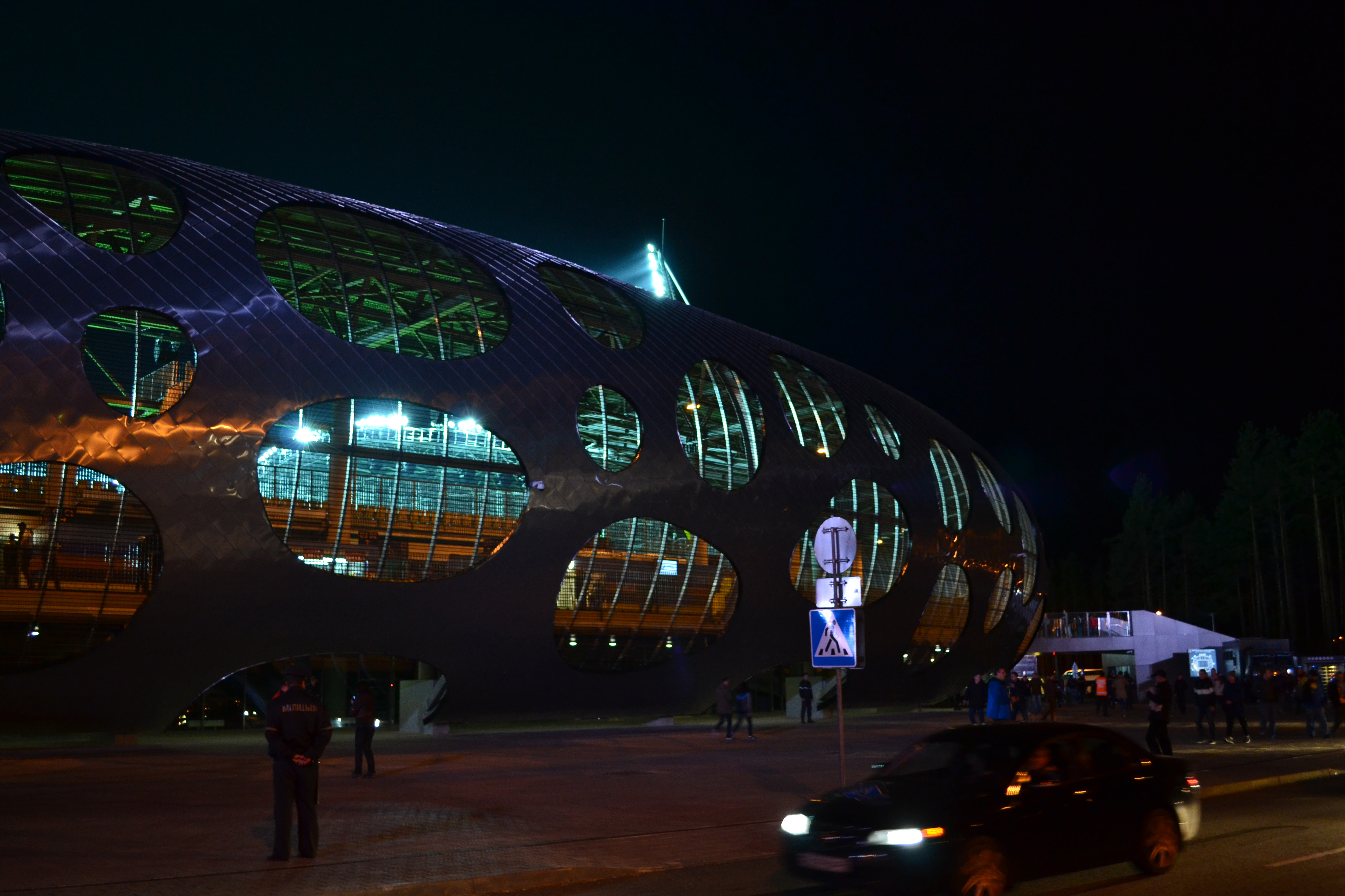 Беларуская (тарашкевіца): Вікісустрэча ў Барысаве на адборачным матчы Беларусь — Украіна